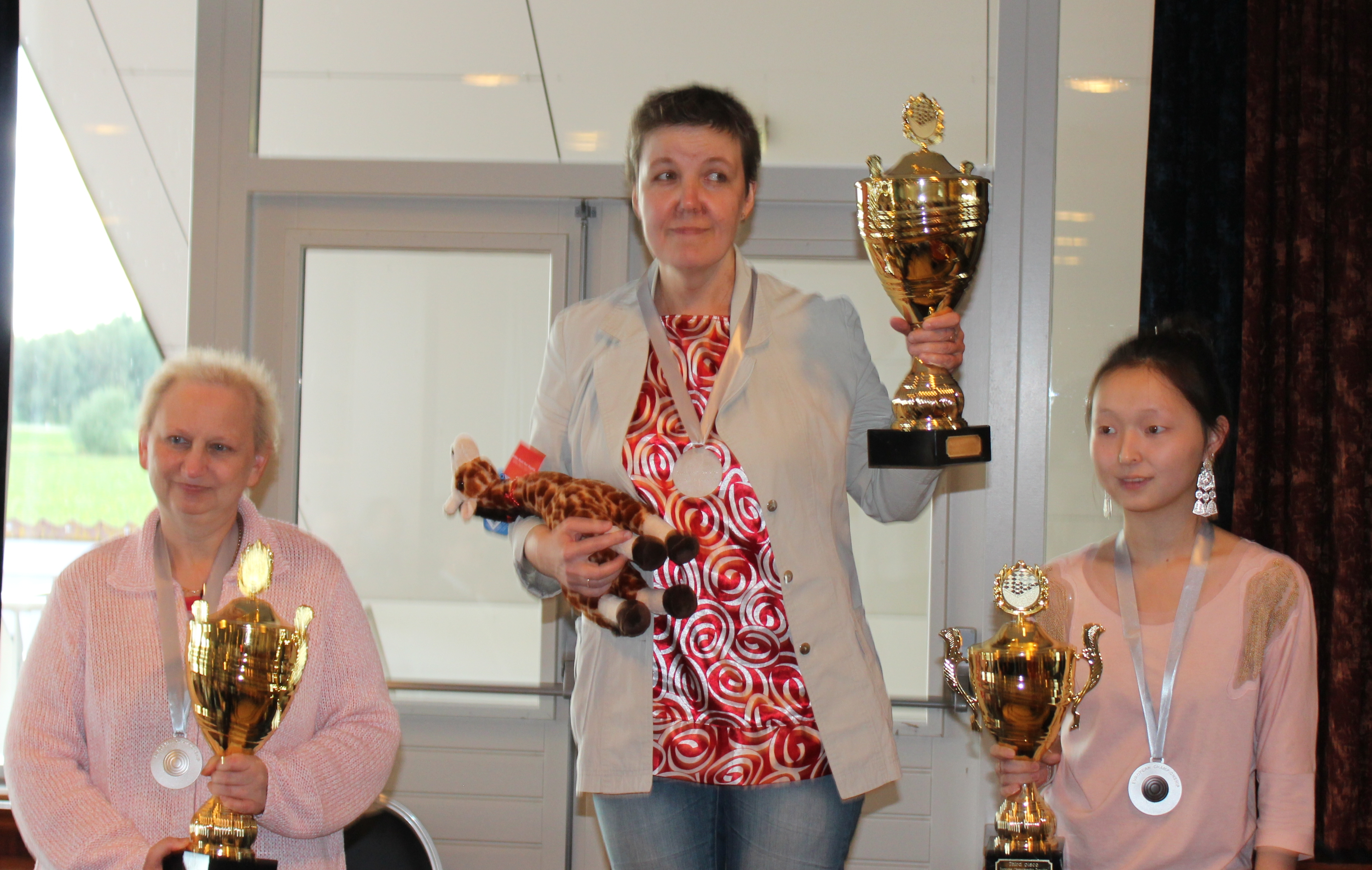 2012. aasta Euroopa naiste meistrivõistlused rahvusvahelises kabes Emmenis, 22. september 2012. Poodiumil seisavad Nina Hoekman, Zoja Golubeva ja Aiõõna Sobakina.